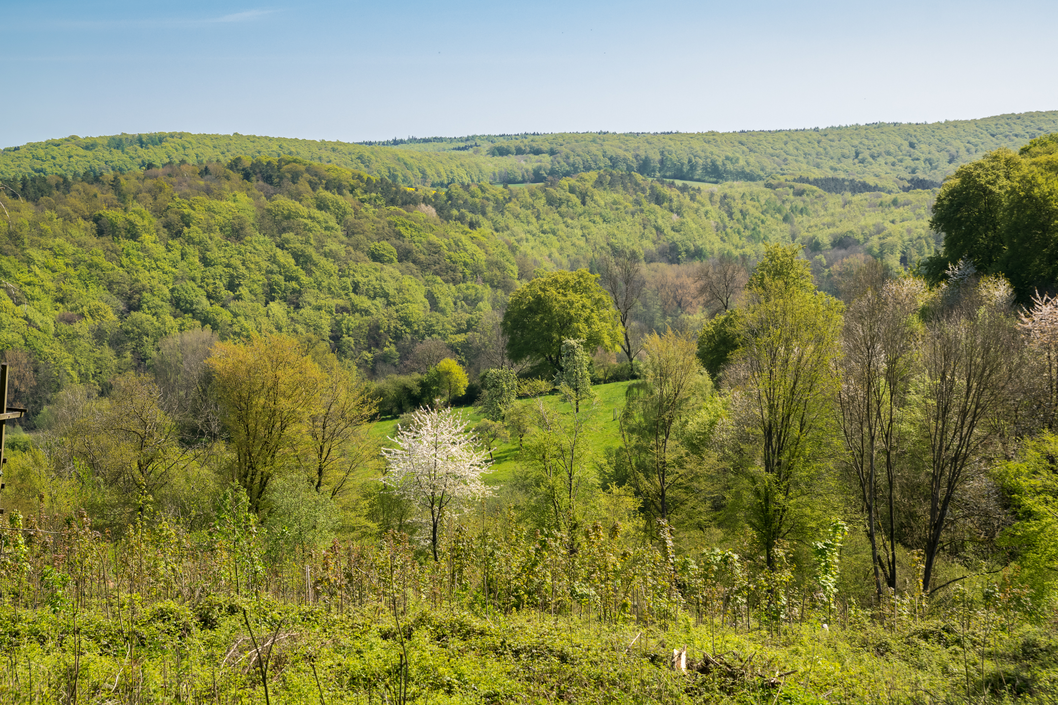 Naturschutzgebiet Rotenberg, Bärenkopf, Habichtsberg und Wihupsberg in Kalletal, Kreis Lippe. Blick vom Wihupsberg auf den Habichtsberg.